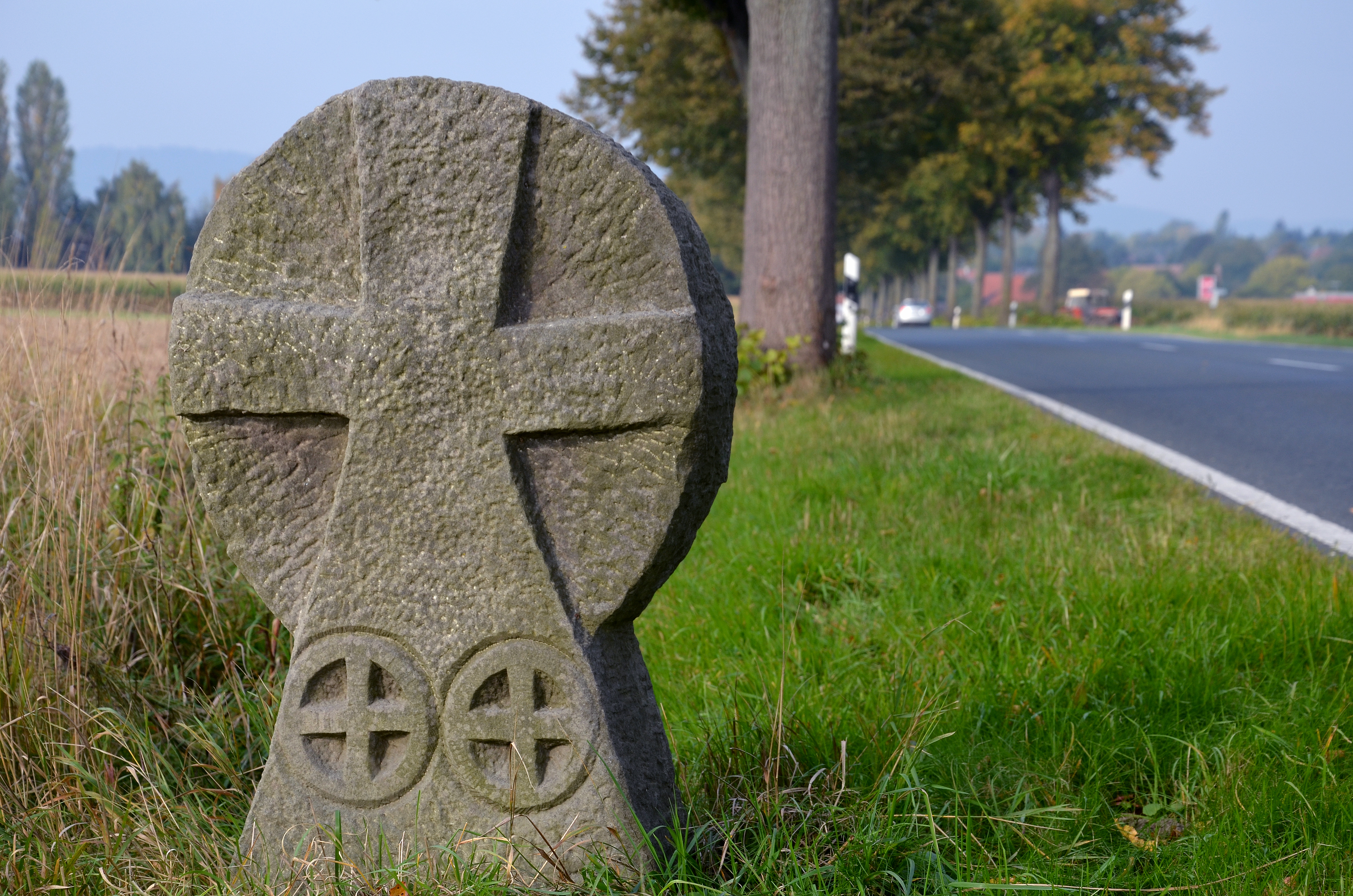 Die 1982 aufgestellte Nachbildung des Alexandersteins, auch Alexanderkreuz genannt, hier an Stelle des ehemaligen Galgens in Höhe der Nonnenmühle an der Landesstraße L 461 zwischen Eldagsen und Alferde ...